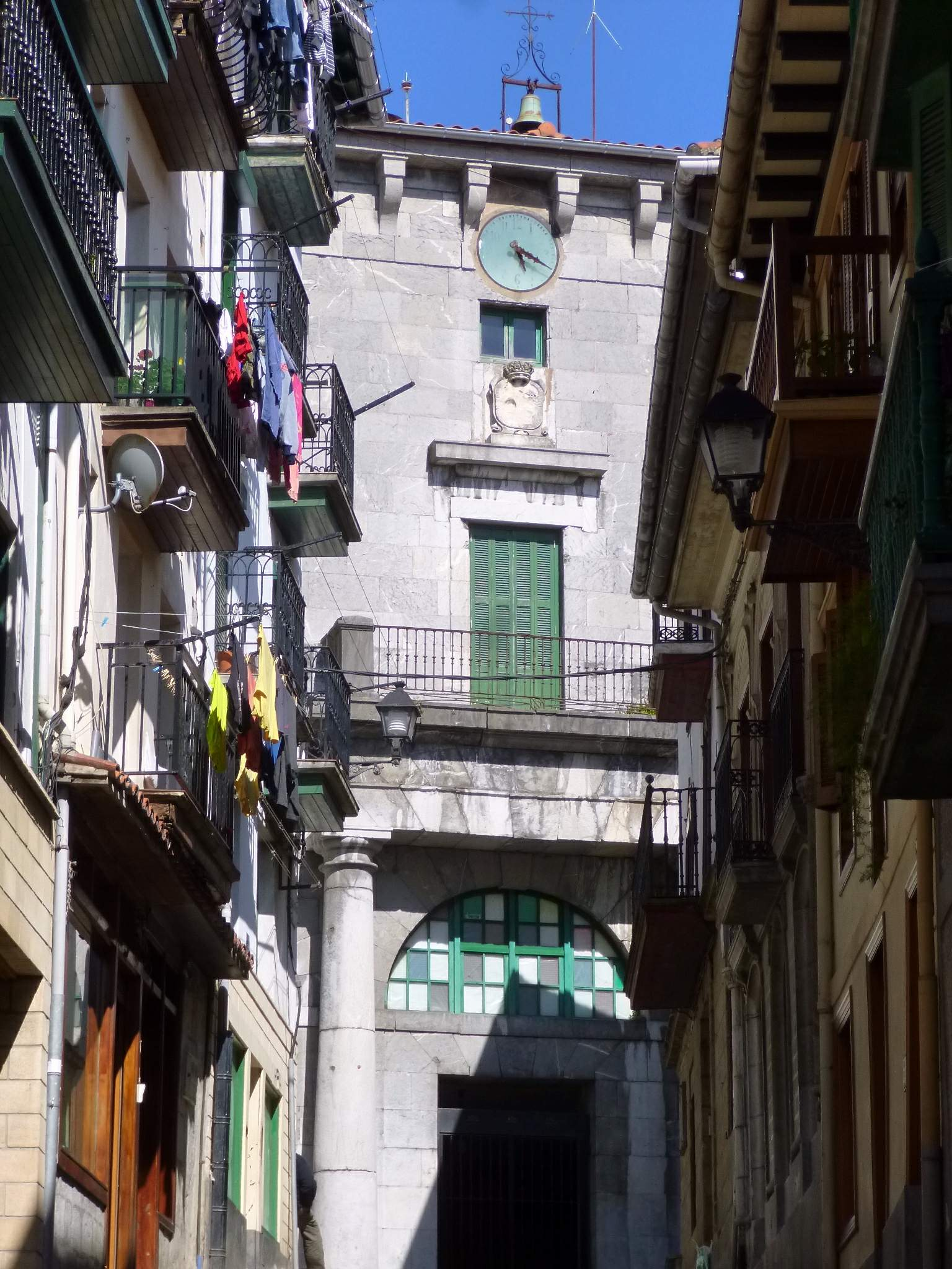 Antiguo Ayuntamiento de Ondarroa (Bizkaia).